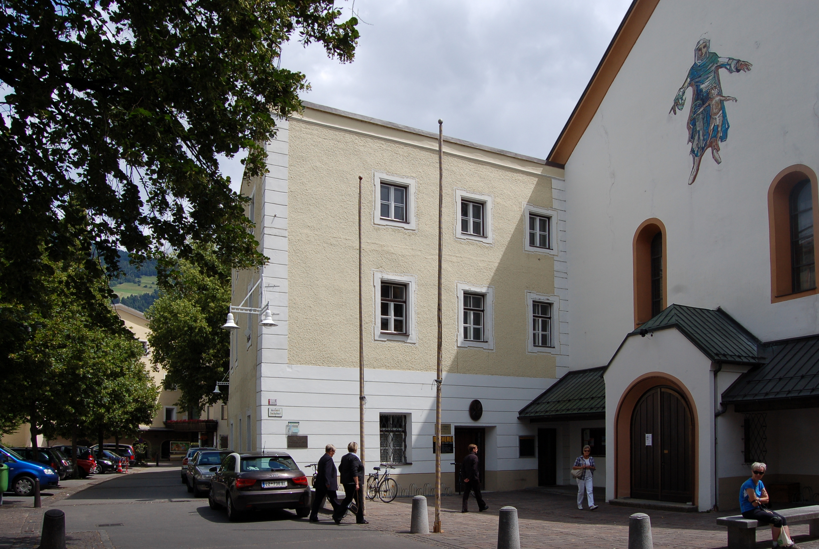 Das denkmalgeschützte Franziskanerkloster Lienz in der Muchargasse 4.